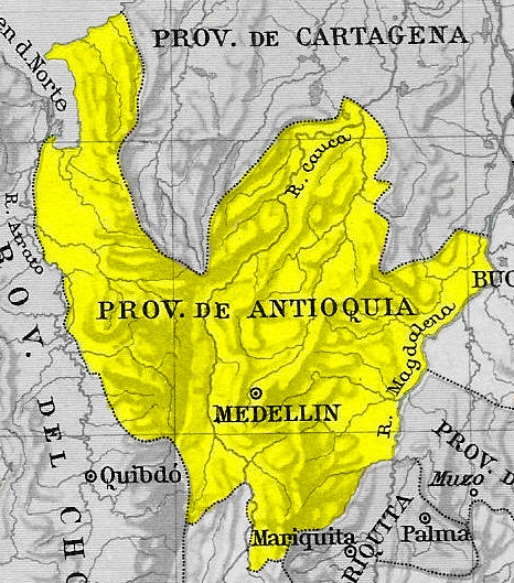 Mapa de la Provincia de Antioquia en 1810 y 1830